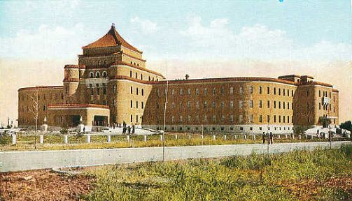 The building of combination courts. Hsinking(新京综合法衙)